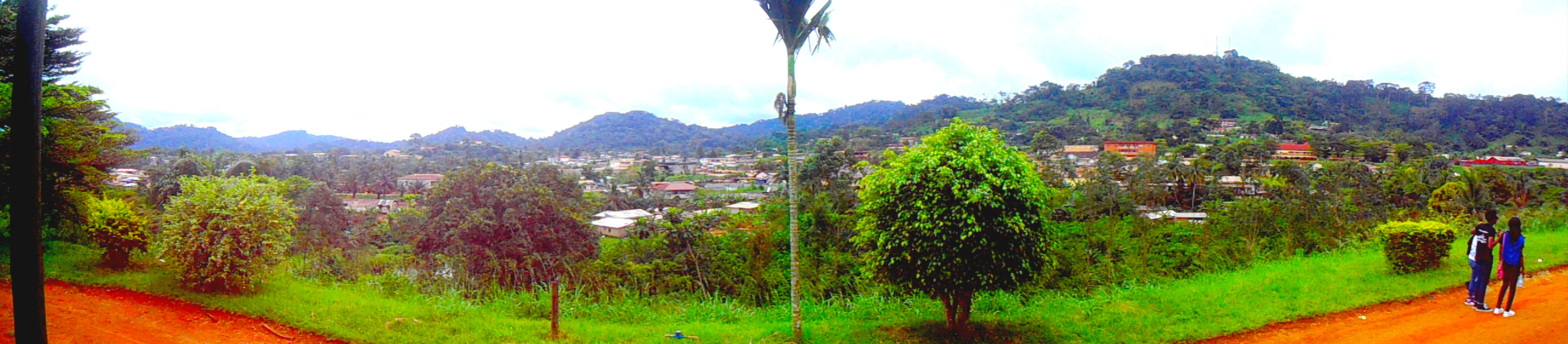 Cette image représente une vue au loin des montagnes à Eséka, locaité située dans le département du Nyong-et-Kellé, région du Centre.